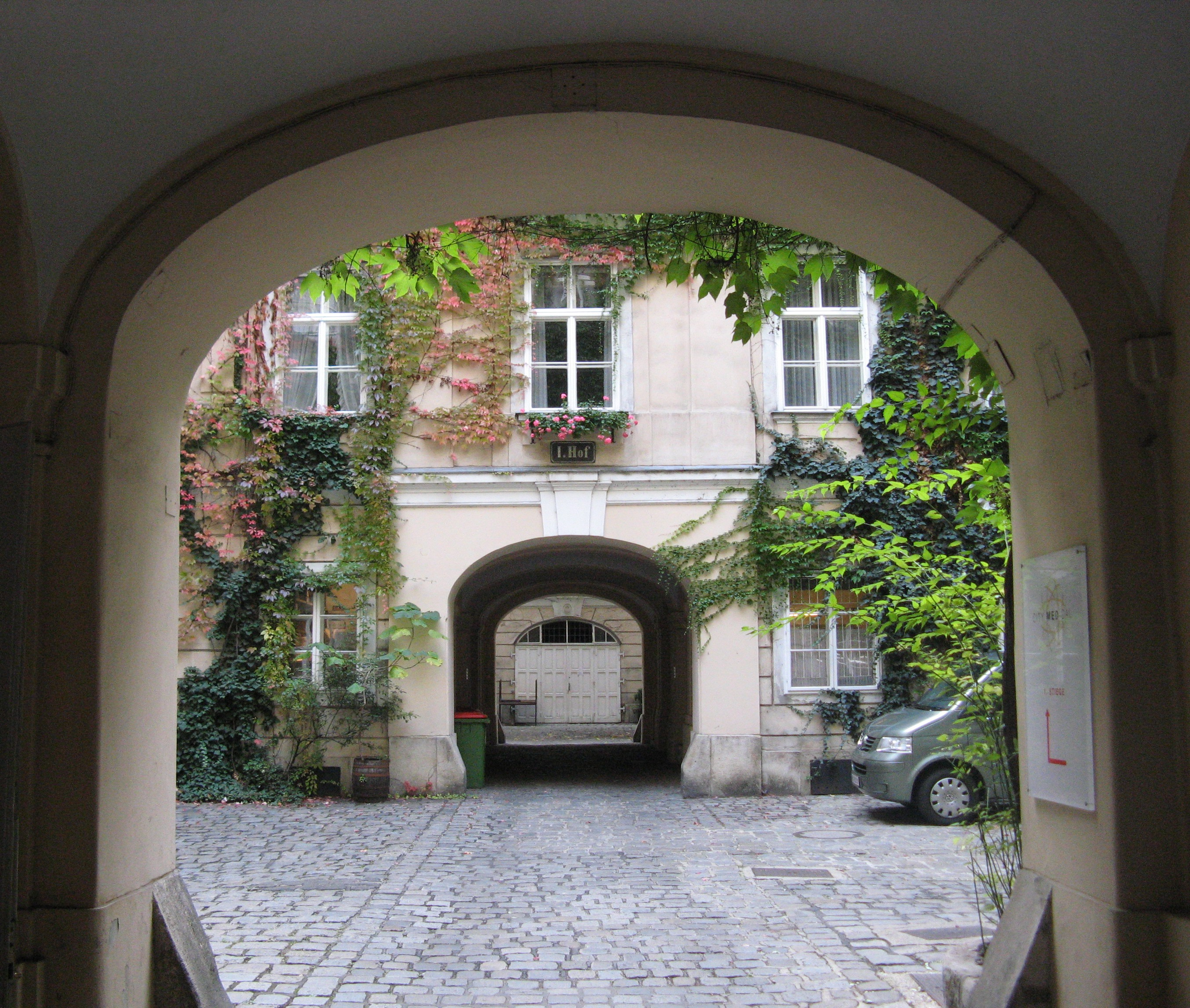 Hof I, Melker Hof, Schottengasse 3a, Wien-Innere Stadt